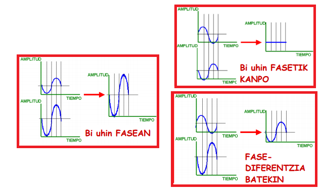 Uhinak fasean, fasetik kanpo eta fase-diferentzia batekin